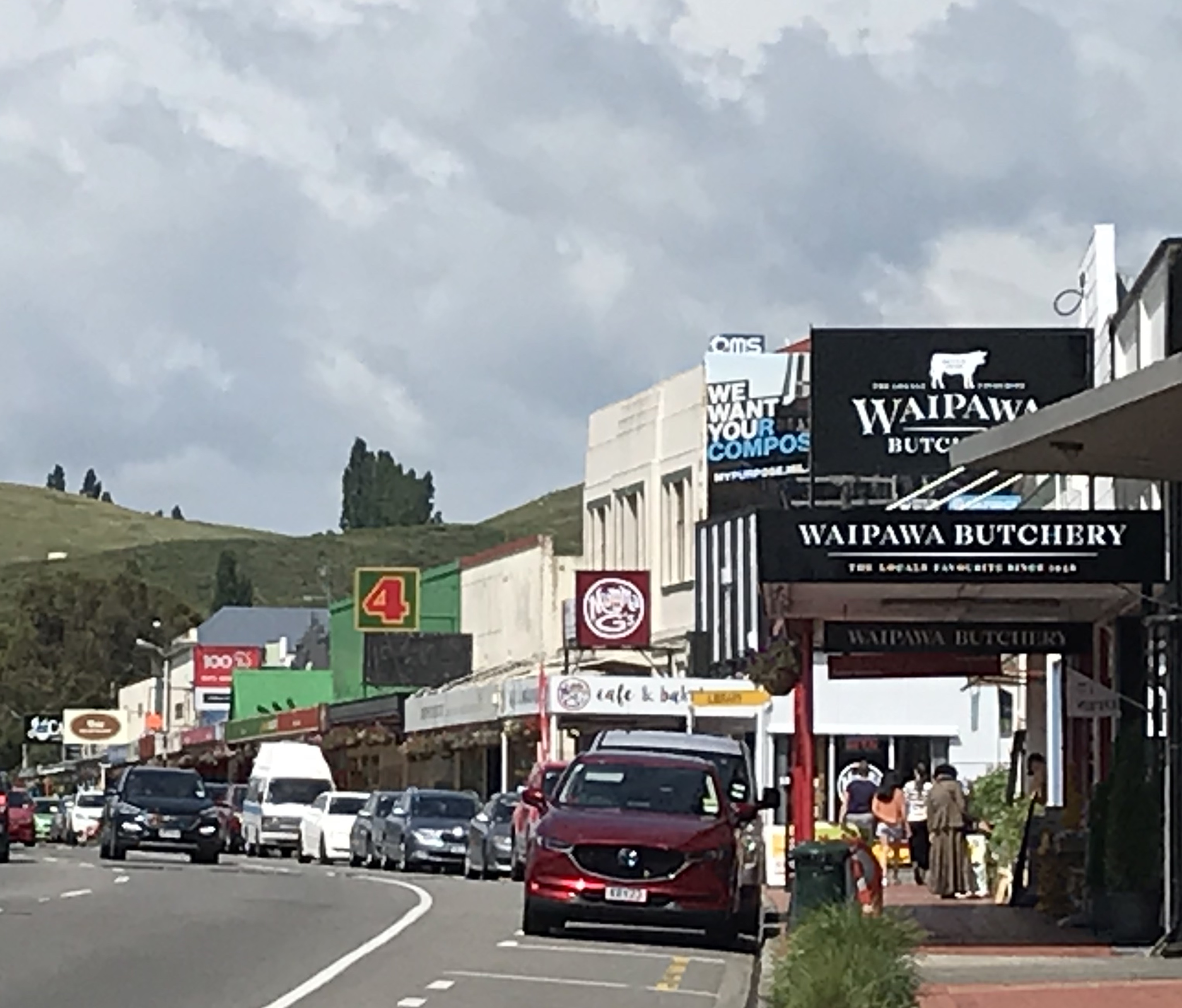 Waipawa